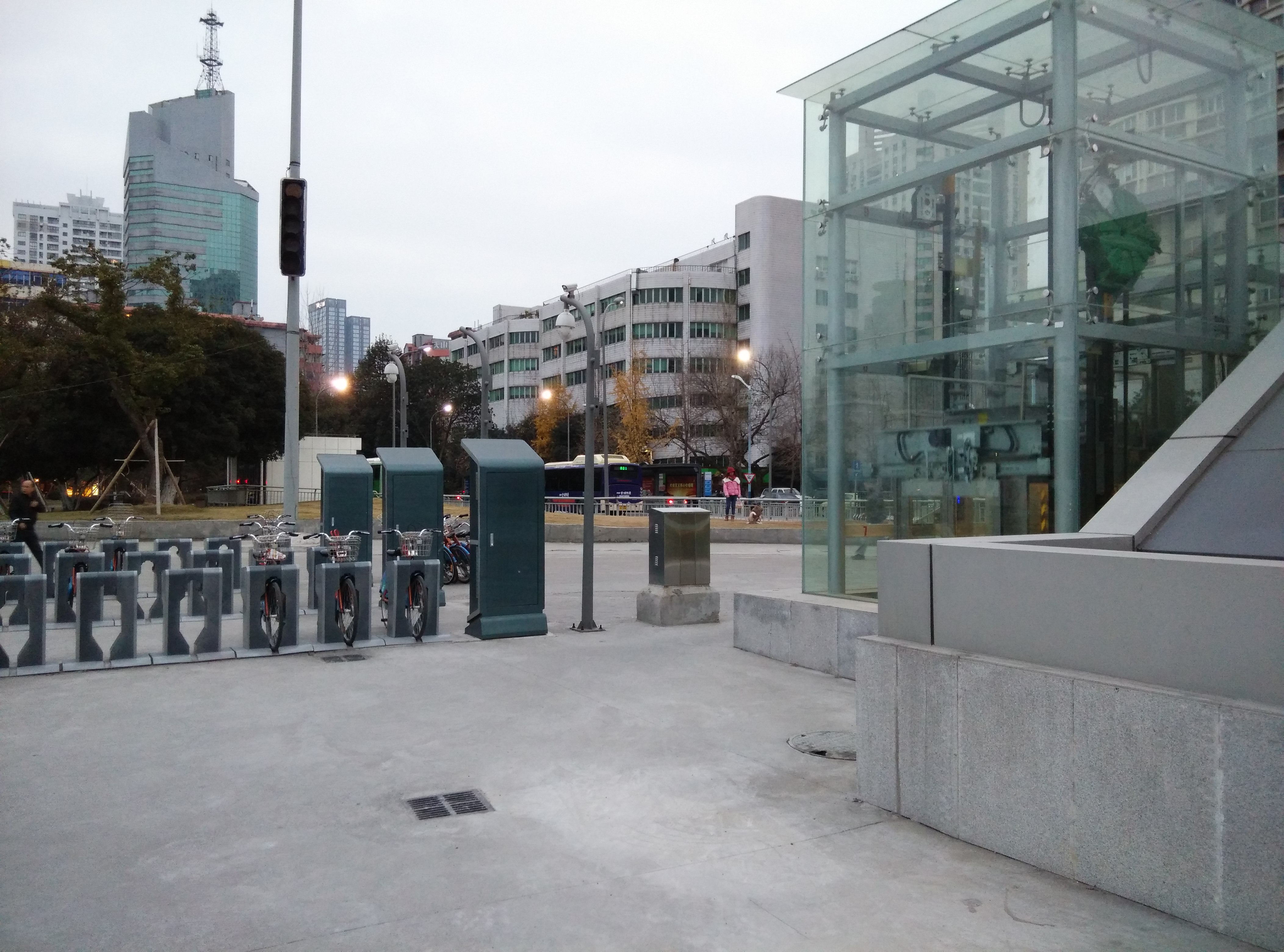 中文（中国大陆）: 宁波鼓楼站H出口外公共自行车与公交站